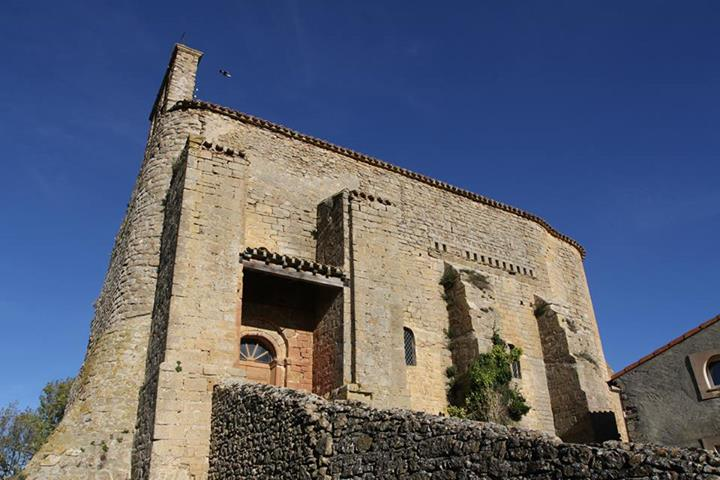 Eglise du XI° siècle inscrite.